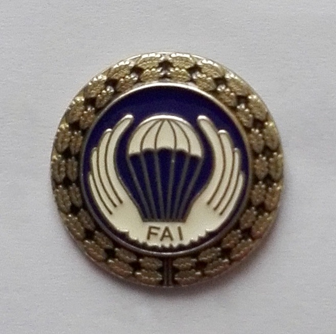 Srebrna Odznaka Skoczka Spadochronowego FAI